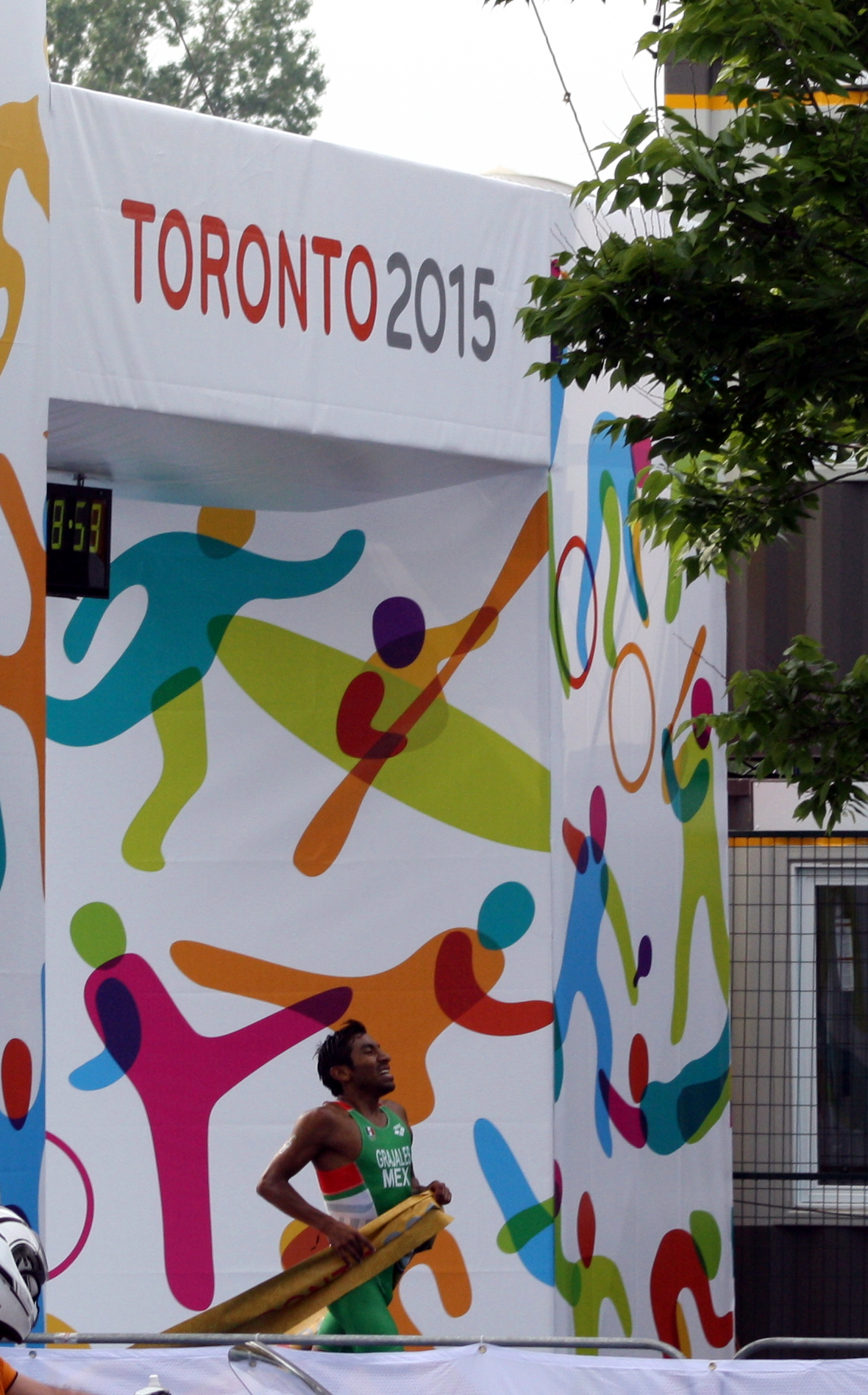 Crisanto Grajales Vainqueur aux Jeux panaméricains de 2015